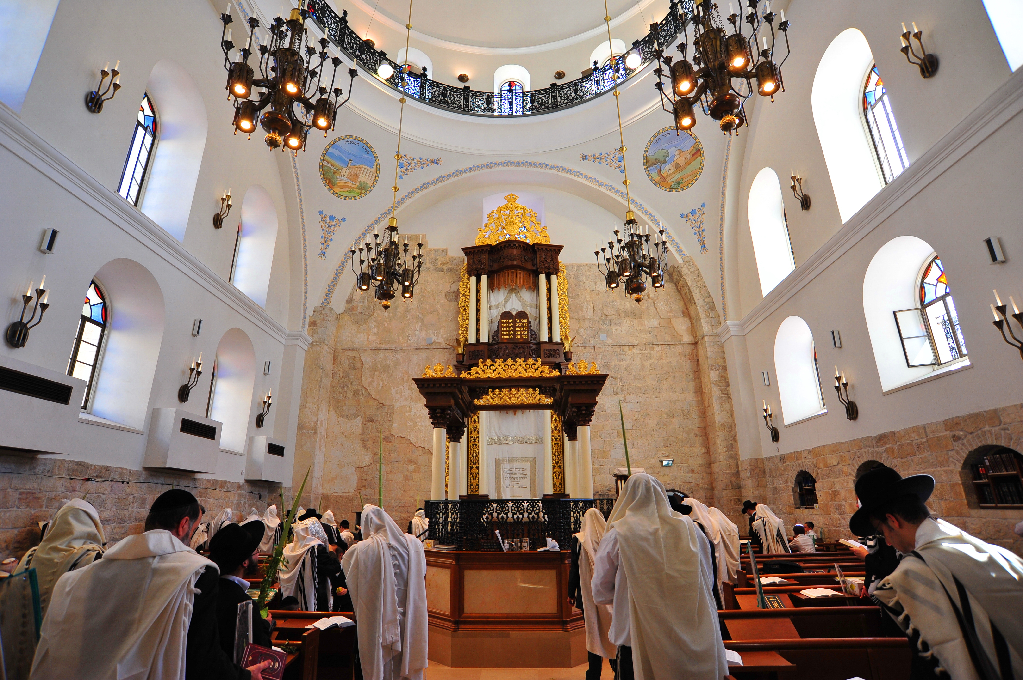 בית הכנסת החורבה או חורבת רבי יהודה החסיד הוא בית כנסת במרכז הרובע היהודי בעיר העתיקה. הוא נבנה לראשונה ב-1700 על ידי חבורת רבי יהודה החסיד ונחרב פעמיים עד שנבנה בשלישית ב-2010.